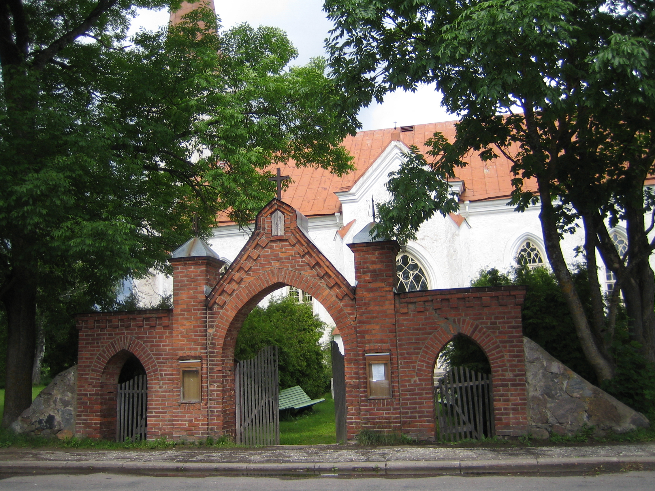 Mustvee luterikiriku värav